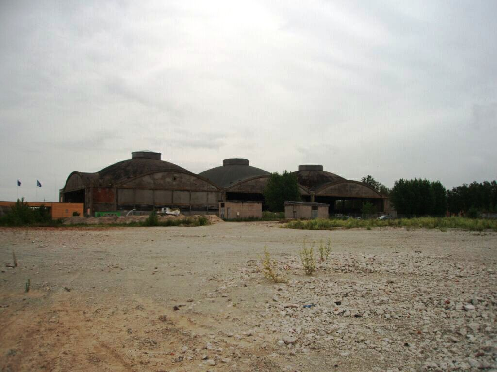 Vesilennukite angaarid Tallinnas, ehitati 1916-1917 Esimese Maailmasõja eelse Peeter Suure Merekindluse osana.